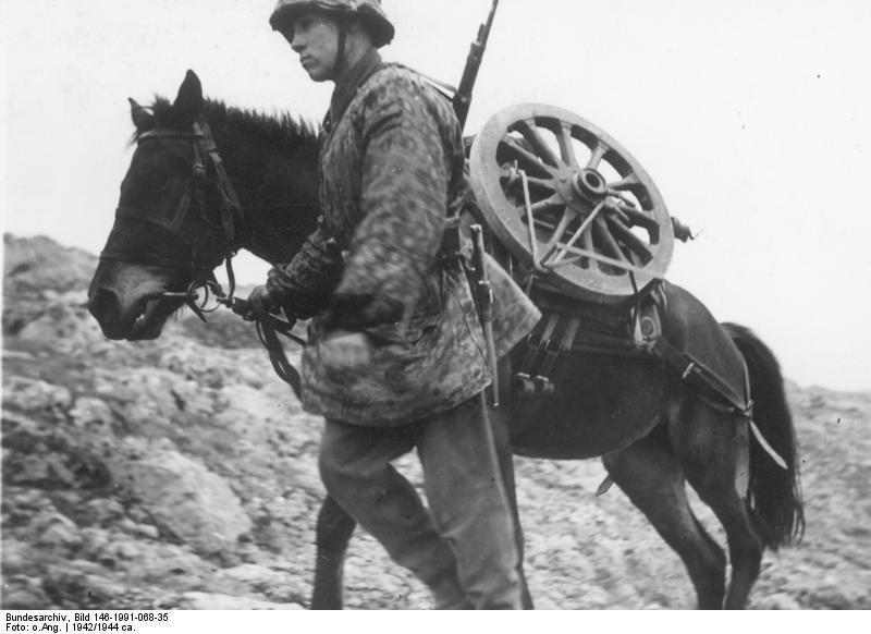 Die Karstschulungsstätte Pottenstein/Oberfranken Ein Bilderatlas mit Erläuterungen Zusammengestellt von SS-Standartenführer Dr. Brand. Der Karstkampf erfordert eine geschulte, leichtbewegliche Artillerie